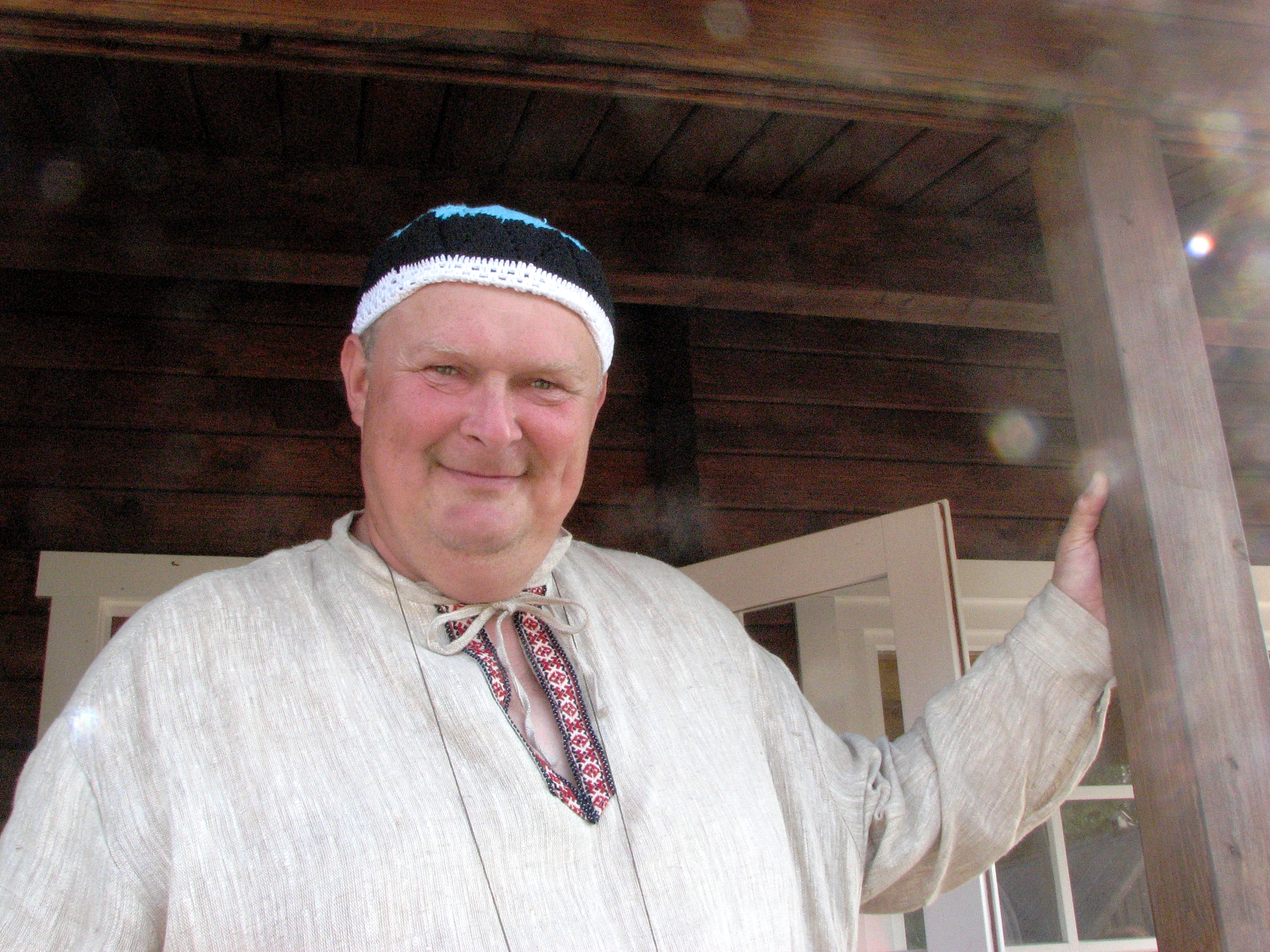 Sulev Peäske 2013. aasta Jööri folgil